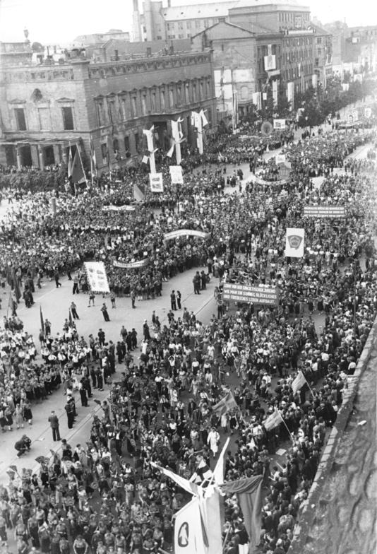 ADN-ZB Donath-Sei-Schm-III.Weltfestspiele der Jugend und Studenten in Berlin 1951 Die große Demonstration der jungen Friedenskämpfer Deutschlands am 12.8.1951 in Berlin. UBz: Der Demonstrationszug in der Straße Unter den Linden.